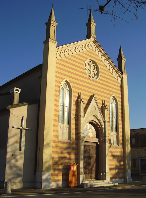 Recente foto della facciata della chiesa parrocchiale di Santa Maria Assunta di Engazzà.